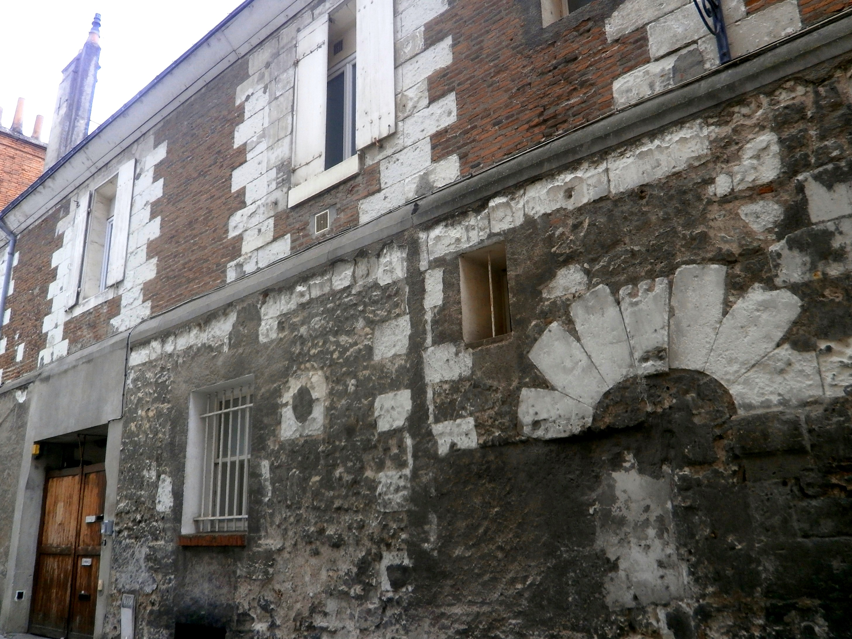 Domicile des grands-parents de René Boylesve à Tours, 8 rue de la Bourde